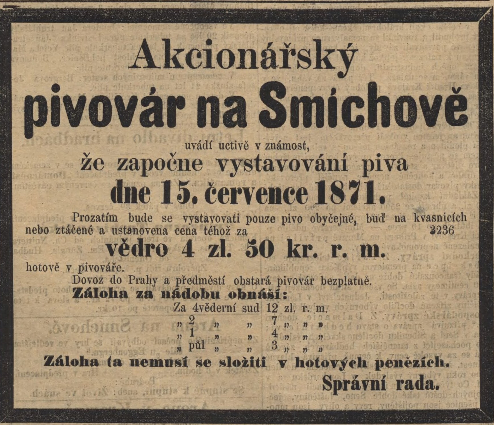 Novinový ústřižek o zahájení výstavu smíchovského pivovaru Staropramen